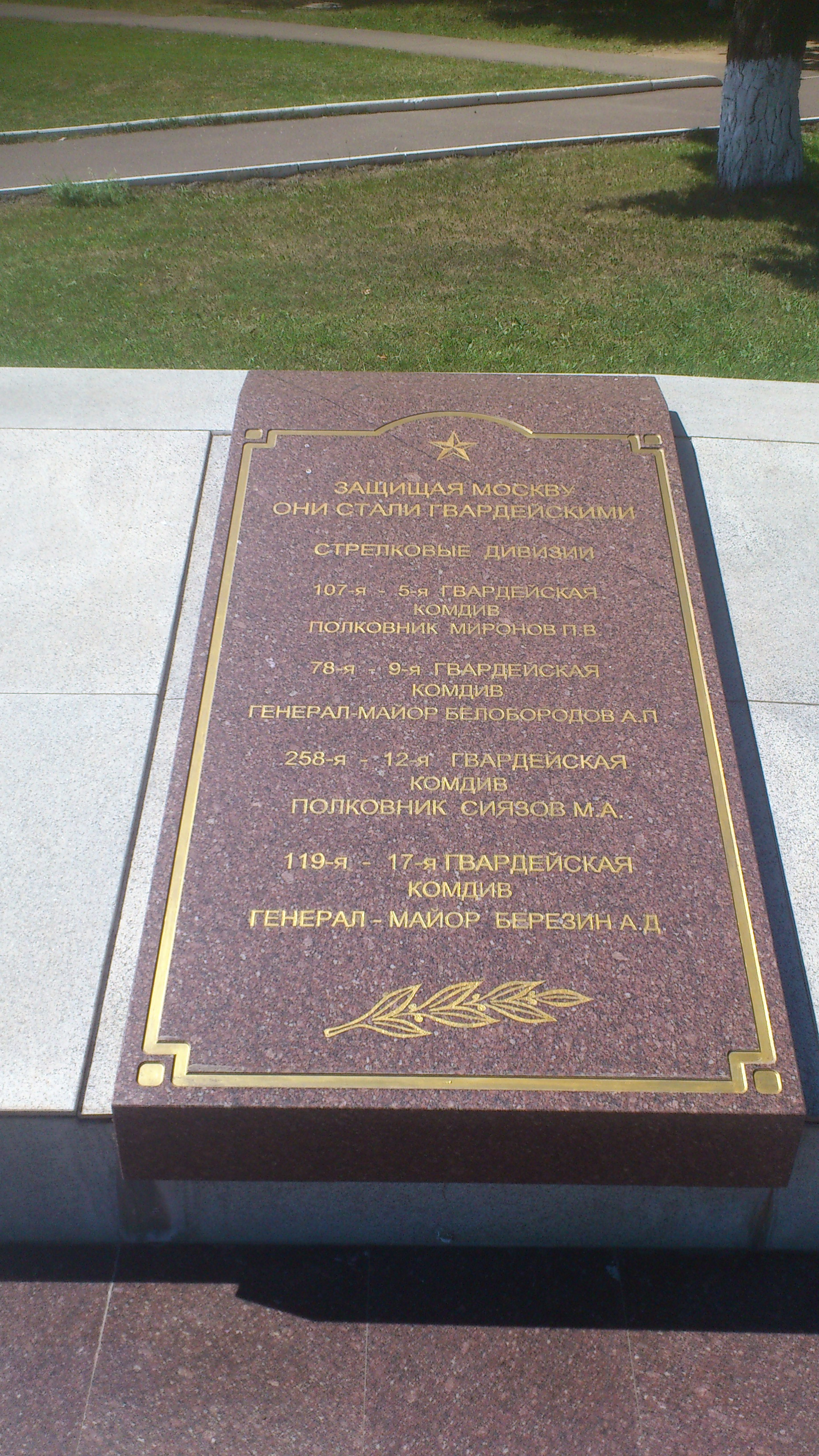 Мемориальный комплекс «Воинам-сибирякам», Ленино-Снегирёвский военно-исторический музей. Надпись на плите: "Защищая Москву, они стали гвардейскими. Стрелковые дивизии: 107-я - 5-я гвардейская, комдив полковник Миронов П. В.; 78-я - 9-я гвардейская, комдив генерал-майор Белобородов А. П.; 258-я - 12-я гвардейская, комдив полковник Сиязов М. А.; 119-я - 17-я гвардейская, комдив генерал-майор Березин А. Д."